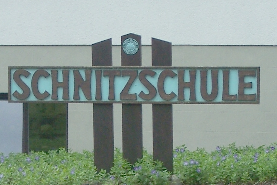 Empfertshausen